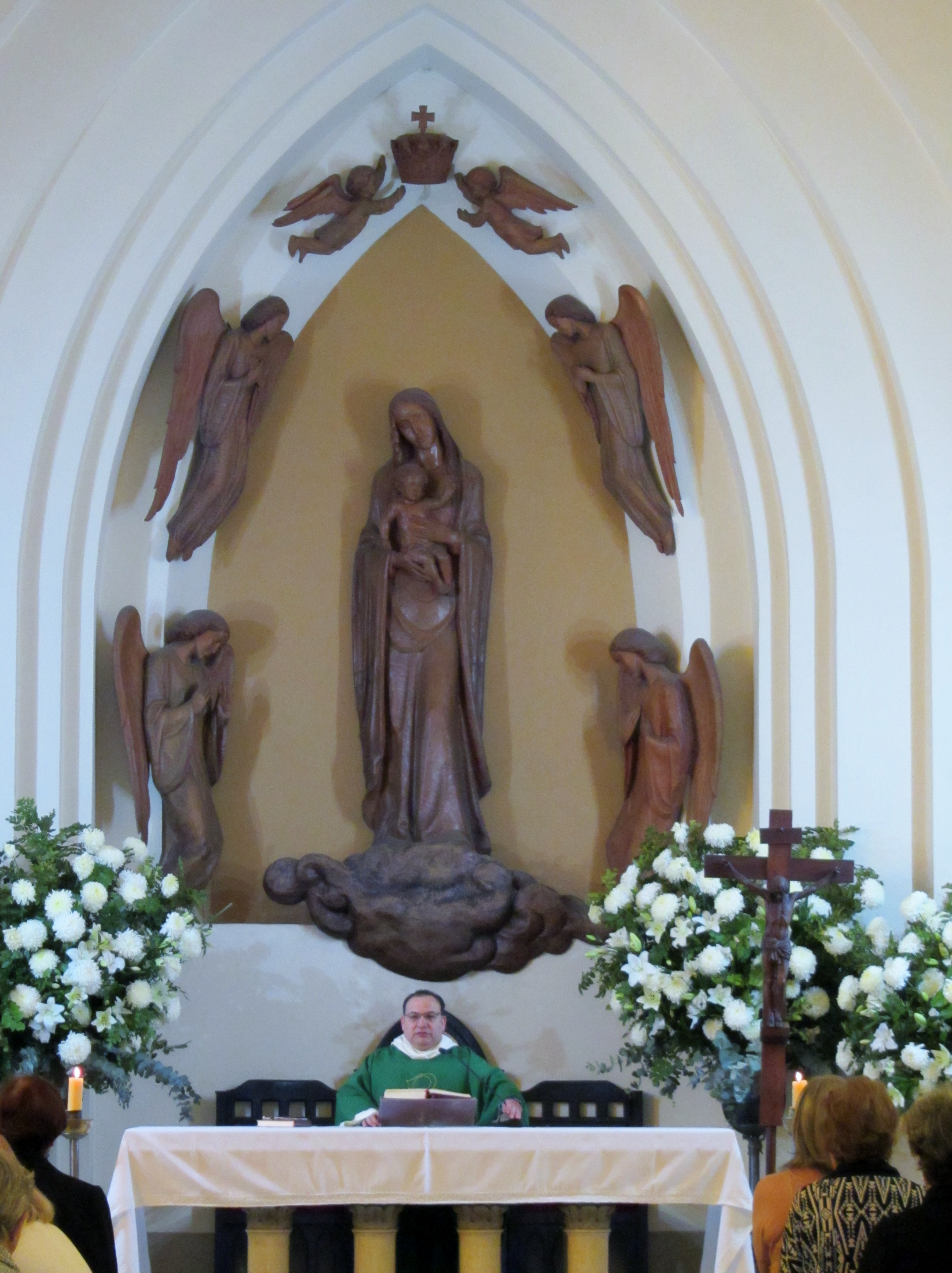 Misa en la Iglesia de Nuestra Señora de los Ángeles en el barrio El Golf